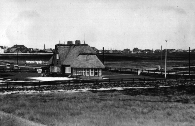 Villa Görings in Wenningstedt auf Sylt (Germany)